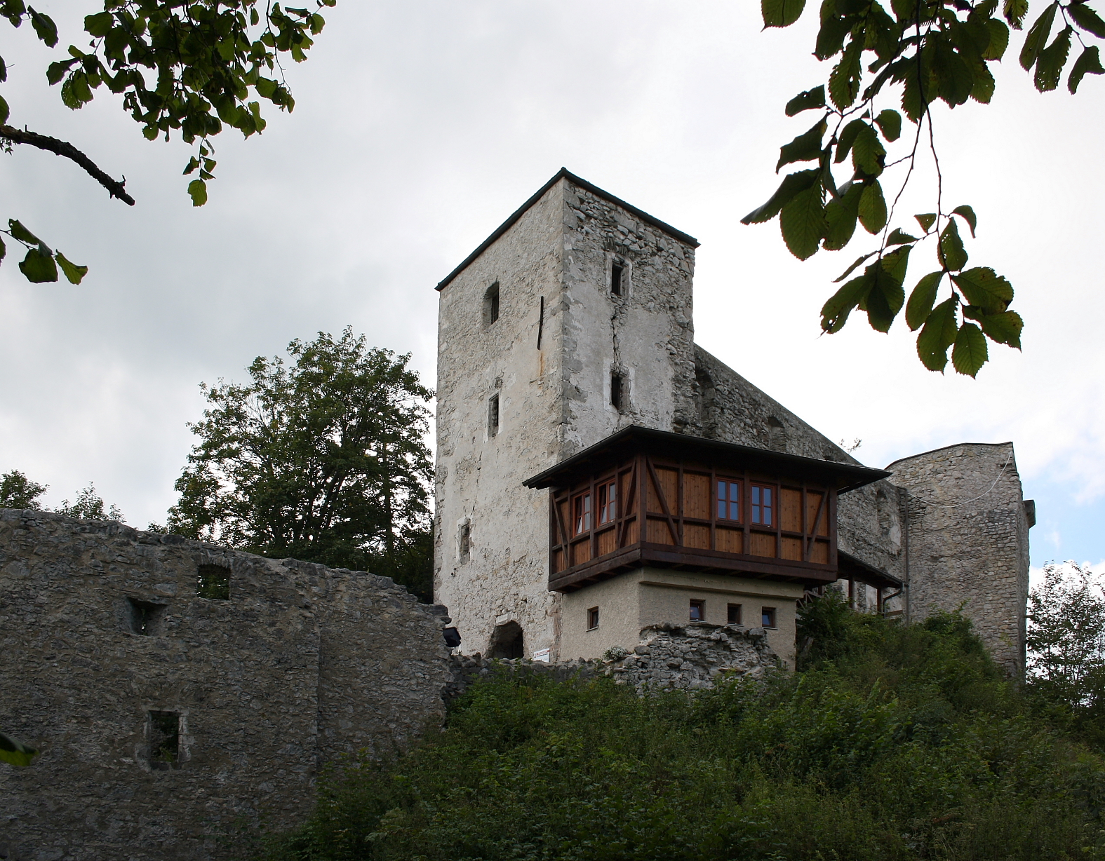 Ostansicht der Araburg.